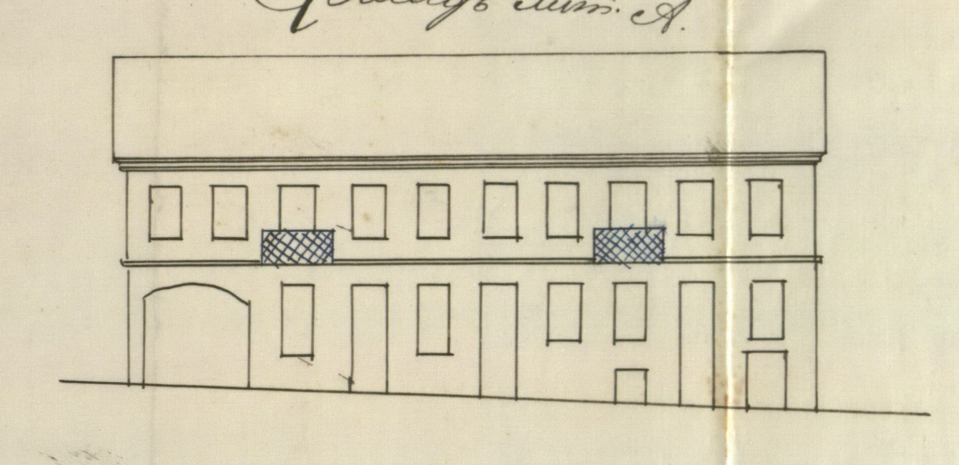 Беларуская (тарашкевіца): Менск (Miensk), вуліца Койданаўская (vulica Kojdanaŭskaja). Гатэль Лівадыя (Livadyja)